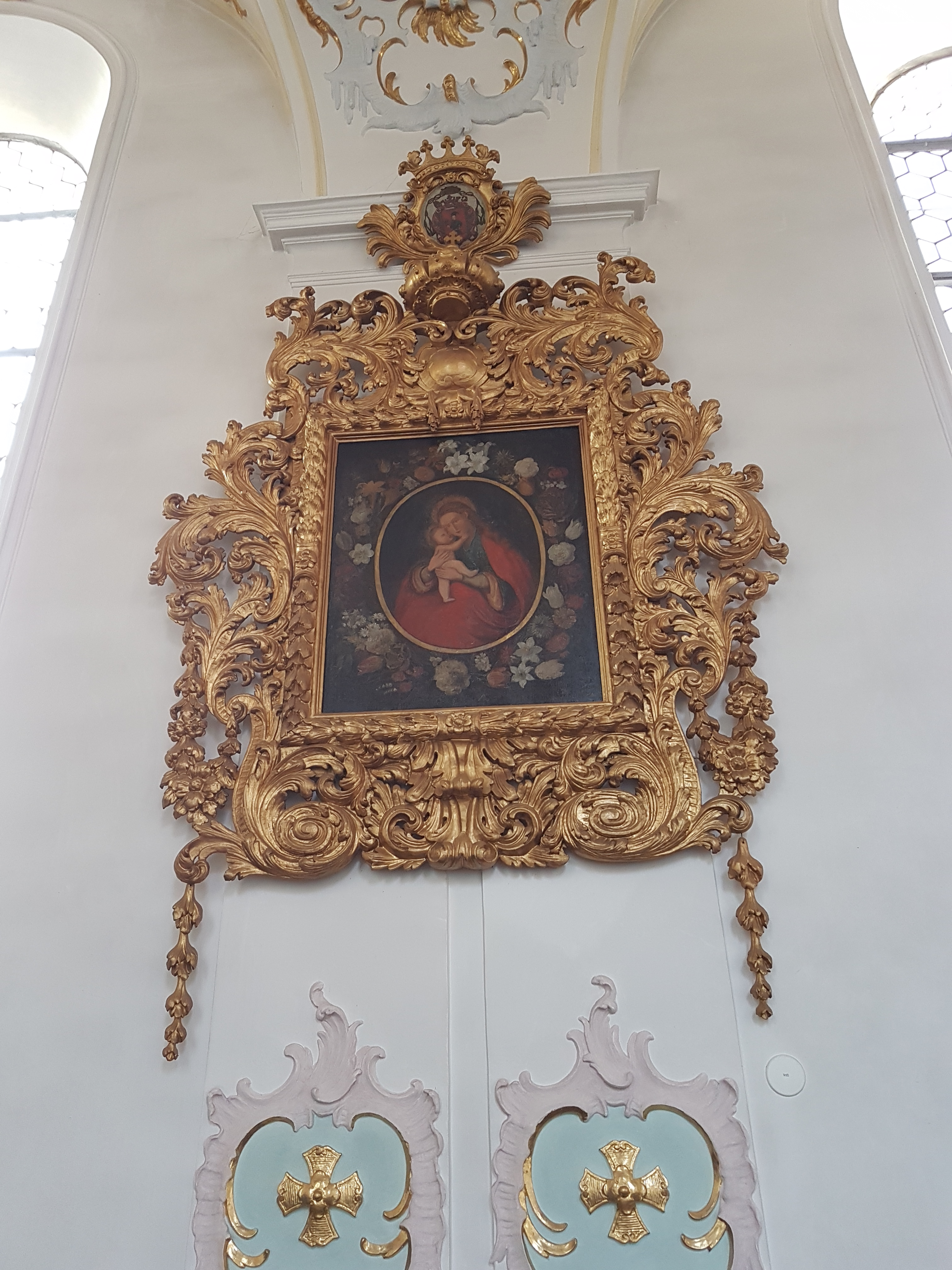 Iffeldorf, St. Vitus